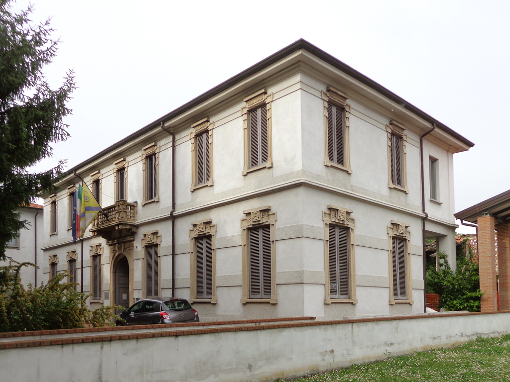 Peschiera Borromeo, frazione Linate, l'ex municipio. Fu costruito nel 1909 su progetto dell'architetto A. Radaelli.